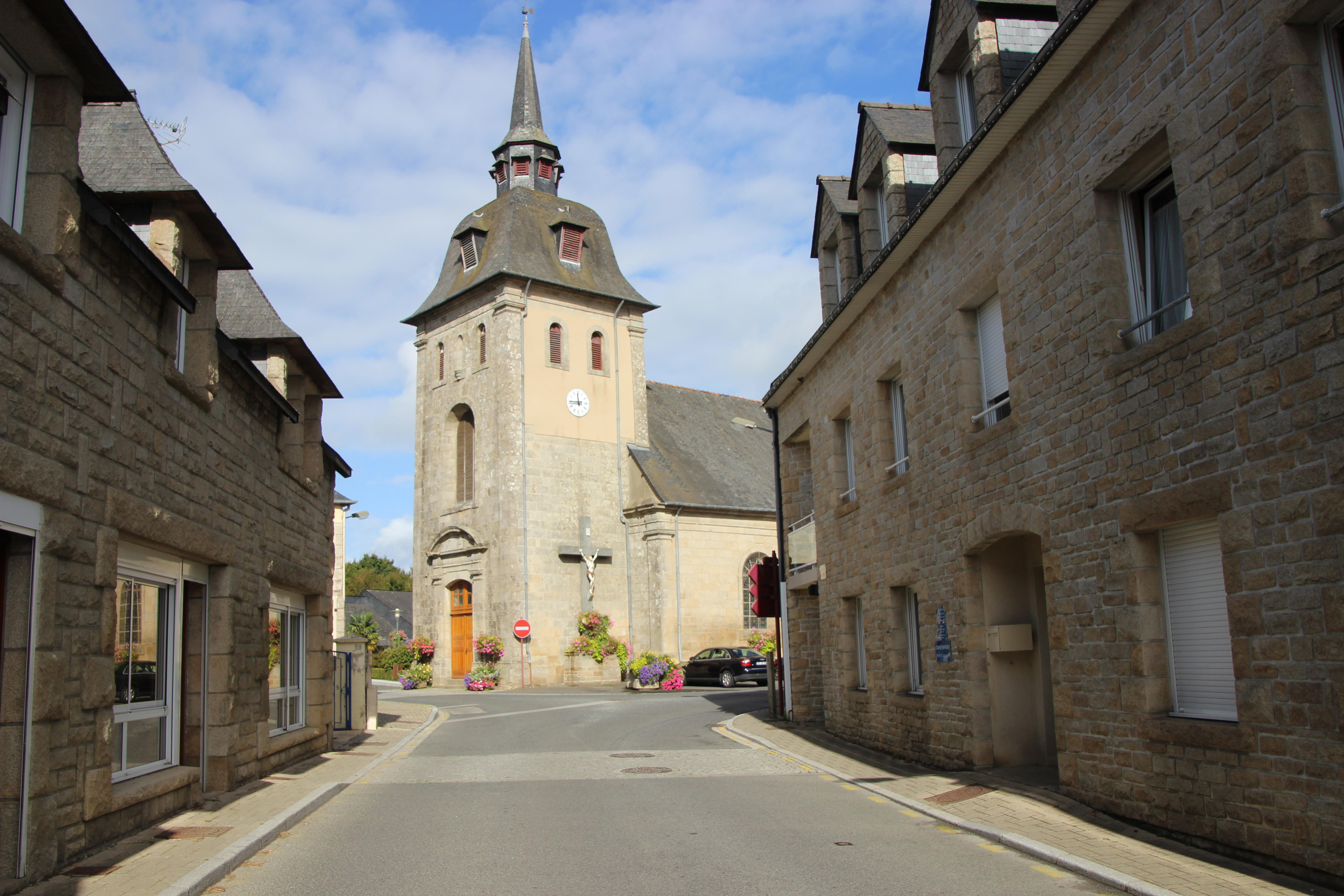 église de La Motte